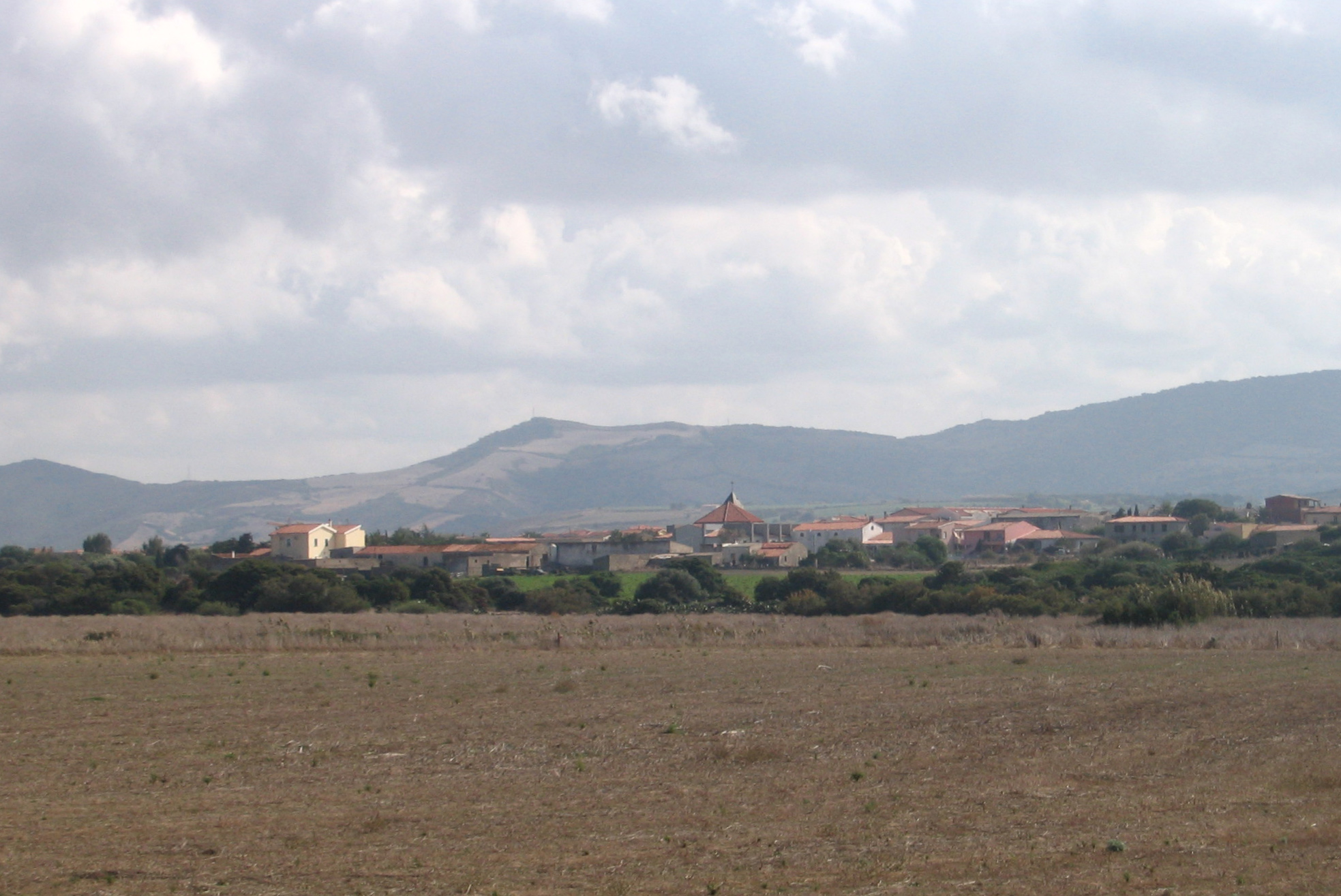 Valledoria von Norden